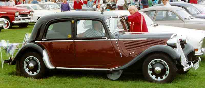 Citroen 11B Berline Legere 1951